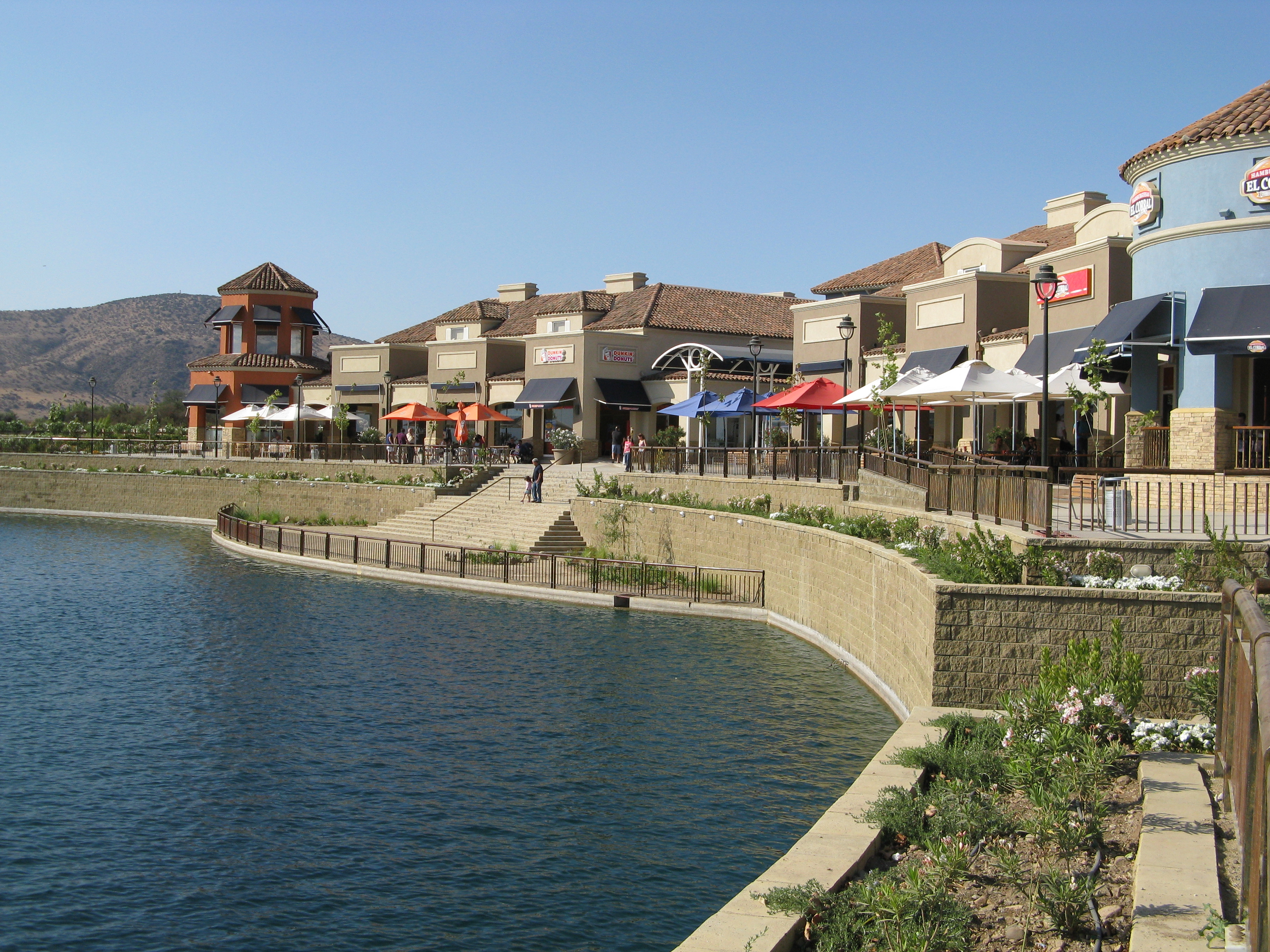 Chicureo, vista a la laguna